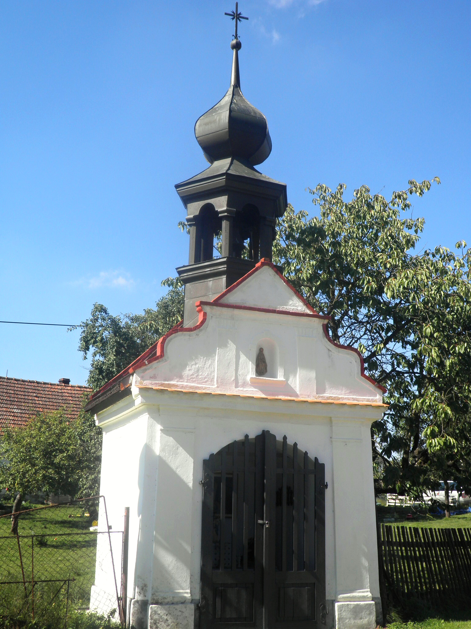 Kaple (Kamenná), náves, Kamenná